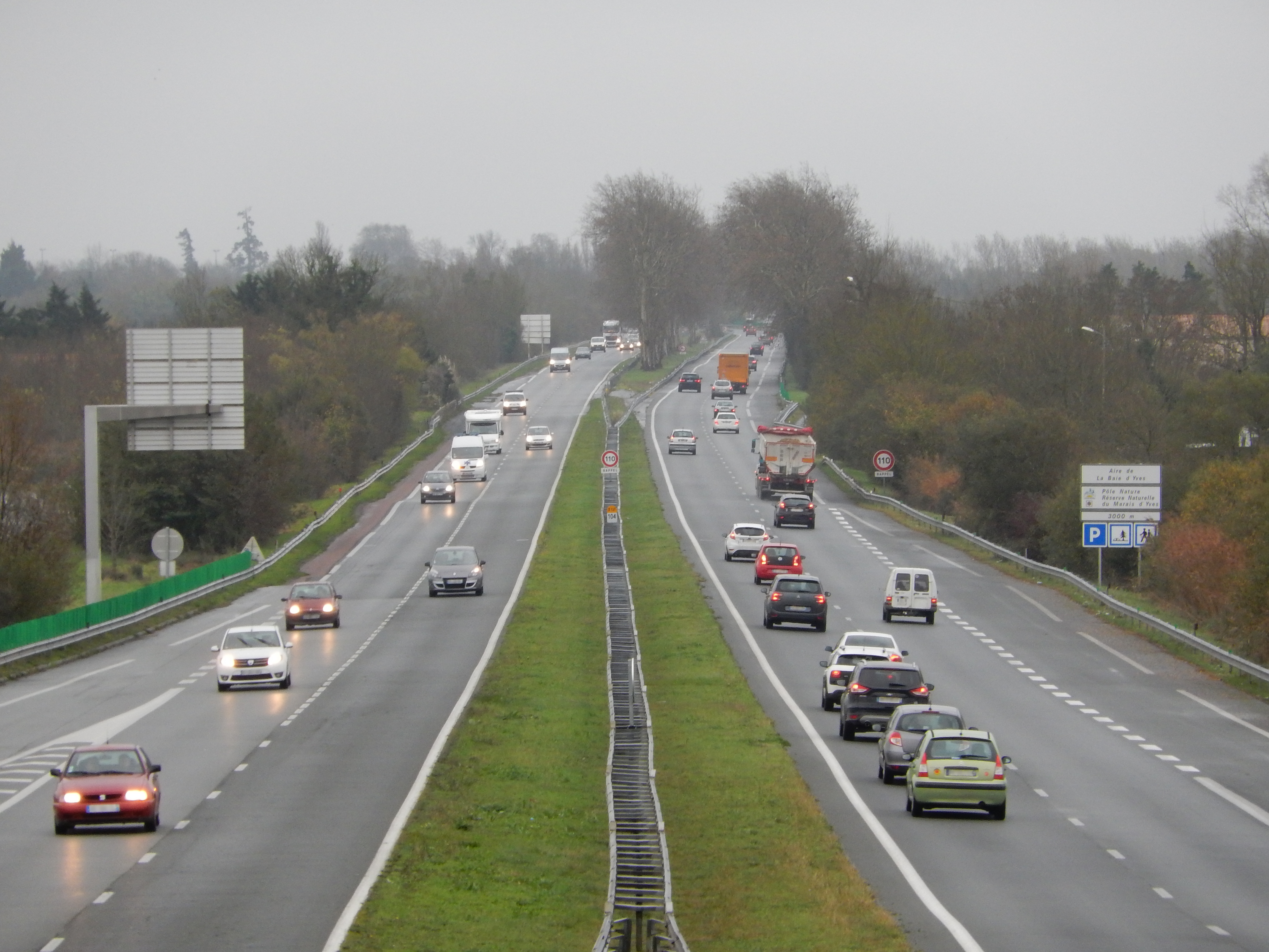 La route départementale 137 (ancienne nationale 137) au nord d'Yves, à la limite communale avec Châtelaillon-Plage (Charente-Maritime, France).